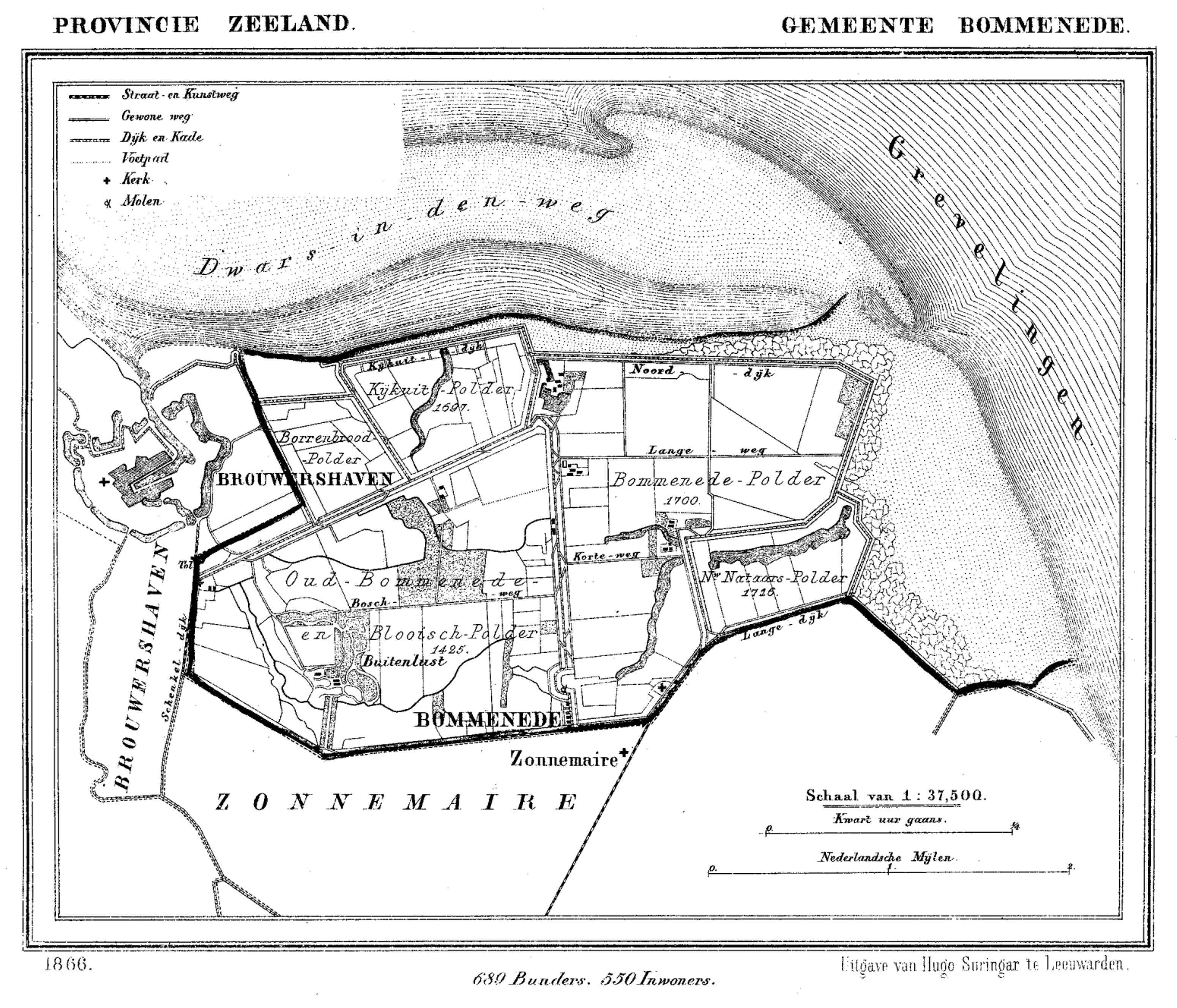 Gemeente Bommenede, Zeeland, Nederland